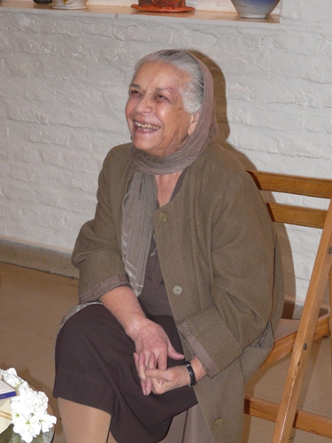 Fakhri Golestan(Maryam Fakhr A'zam Taghavi Shirazi!!!)-Hamsare Ebrahim Golestan-Madare Leili va Kave Golestan-Madarbozorg Mani Haghighi,...